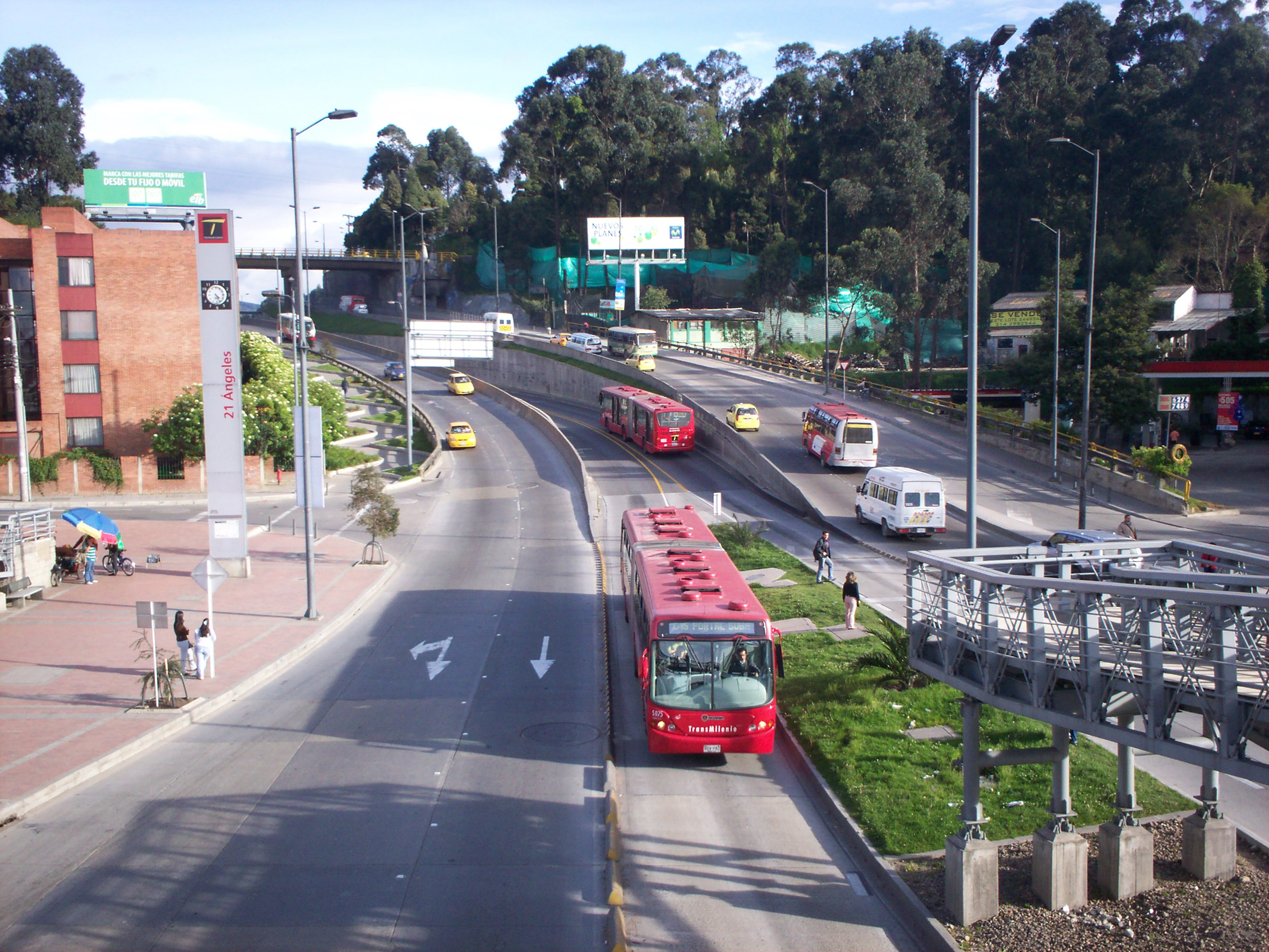 TransMilenio sobre la Avenida Suba (estación 21 Ángeles).